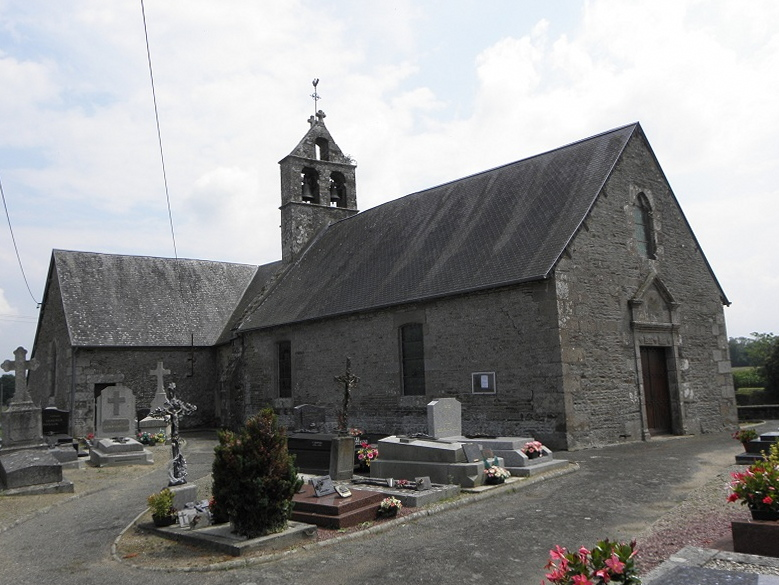 Église paroissiale Saint-Pierre de Villiers-le-Pré (50).